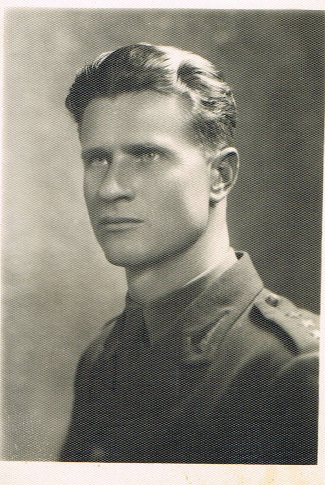 Kpt. Władysław Iwanowski (poległ w 1944 pod Monte Cassino)